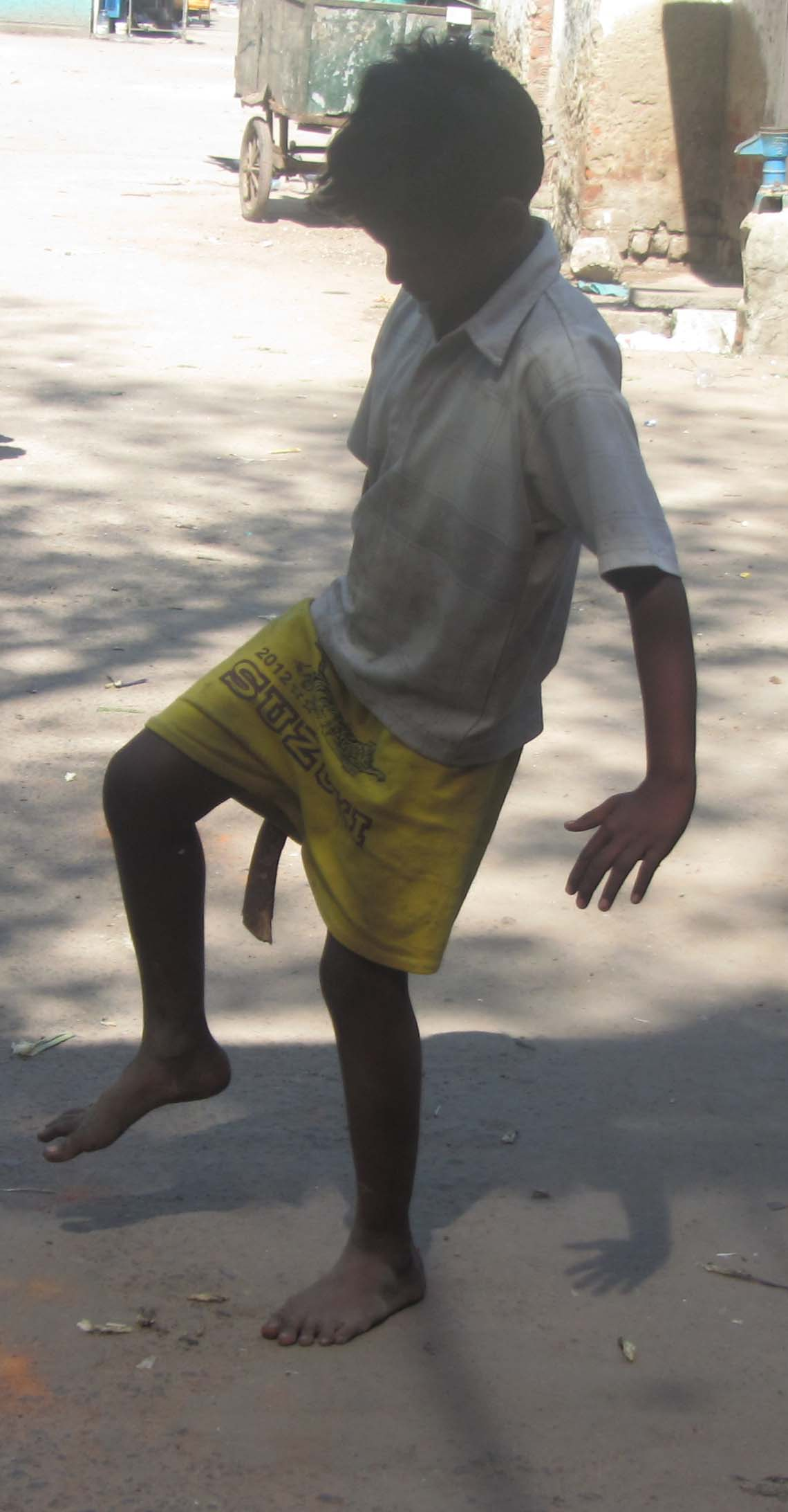 கல்லுக்குச்சி விளையாட்டில் குச்சி எறிதல் - own shot